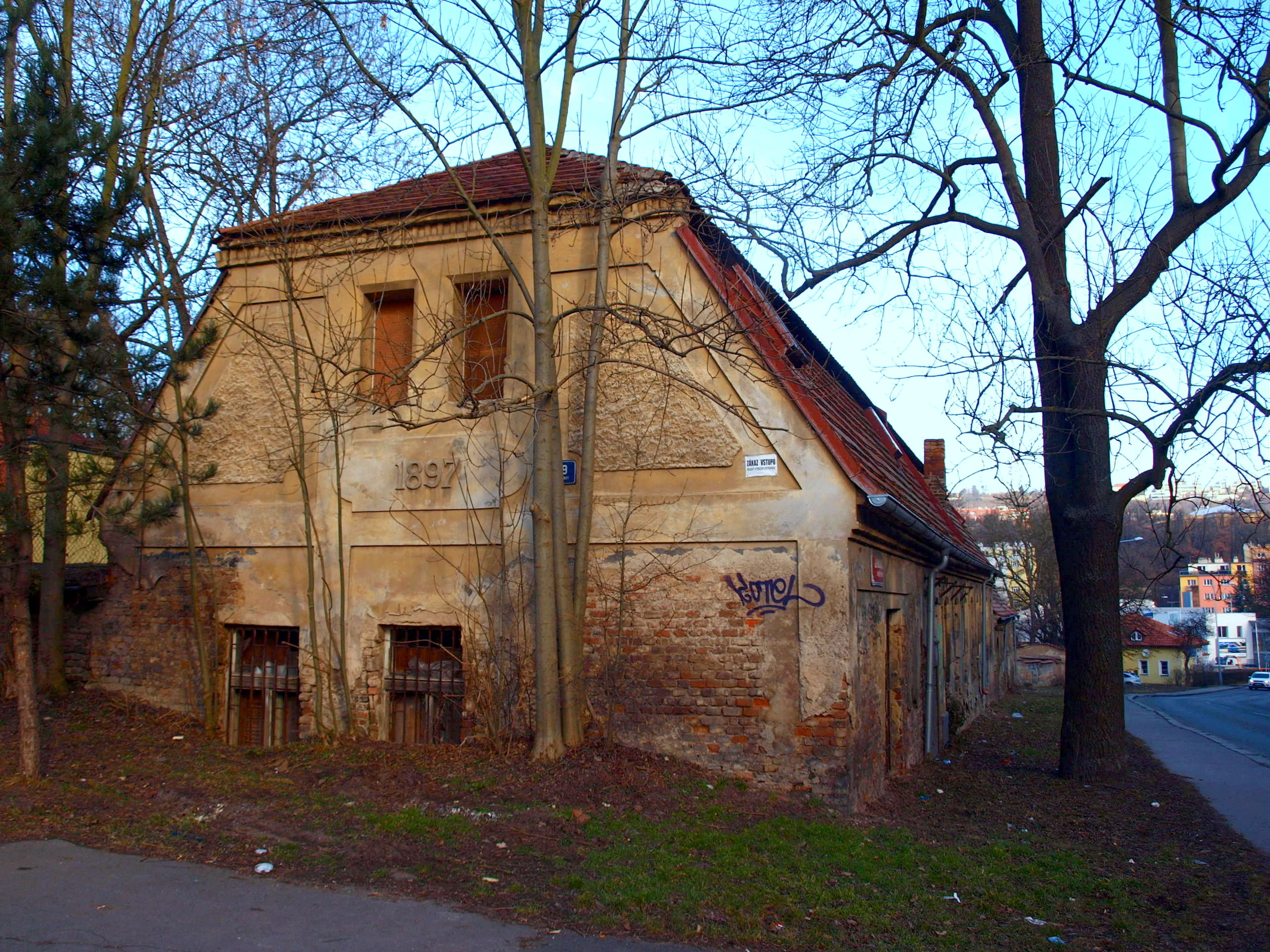 Usedlost Turbová